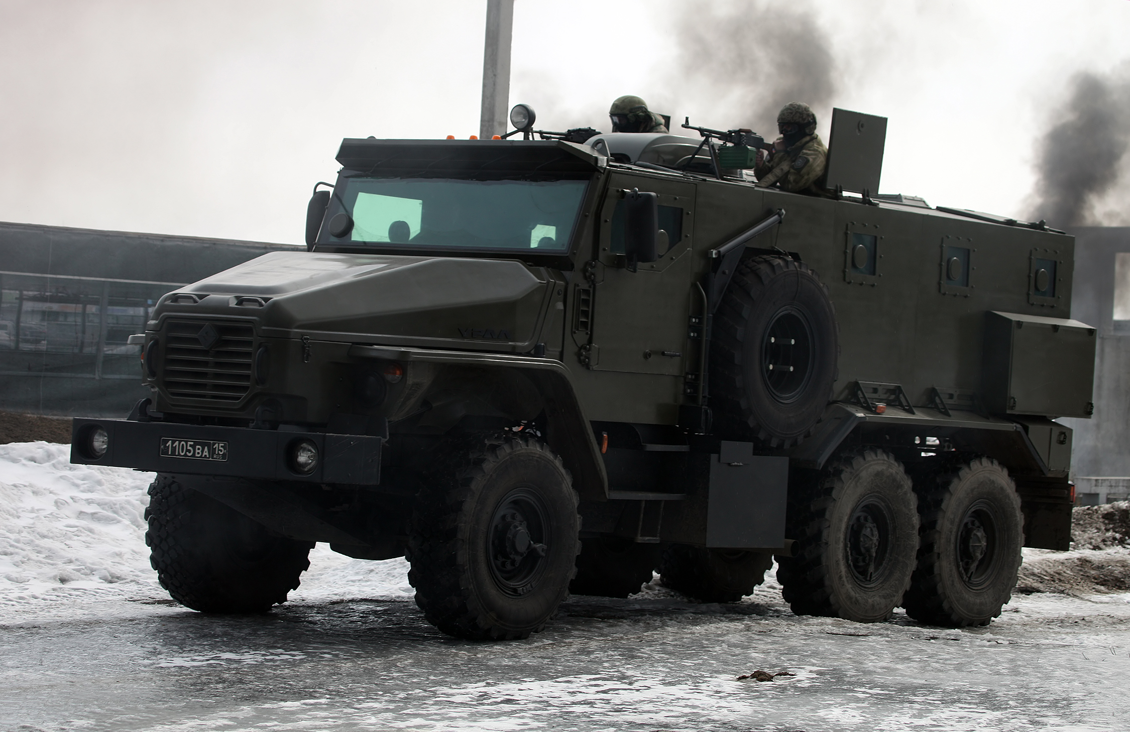 Военнослужащие ЦСН Витязь преодолевают огненно-штурмовую полосу при поддержке бронетехники.